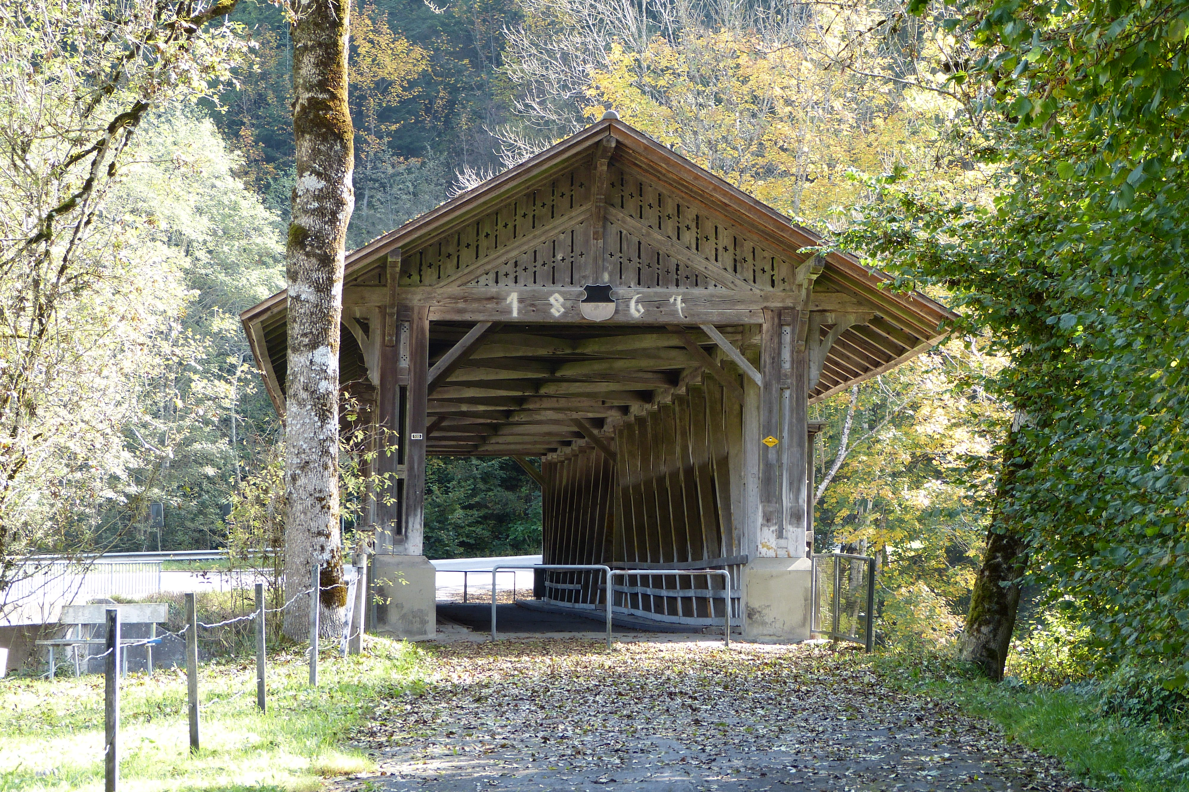 Sodbachbrücke